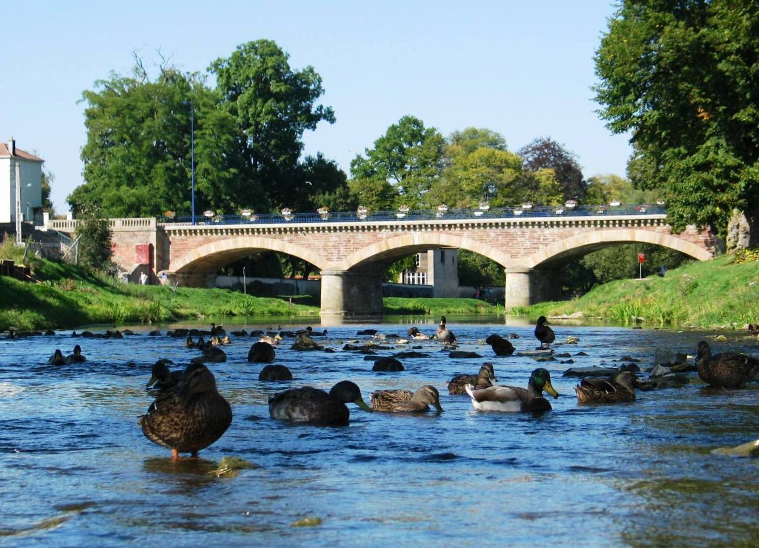 De Madon bei Mirecourt